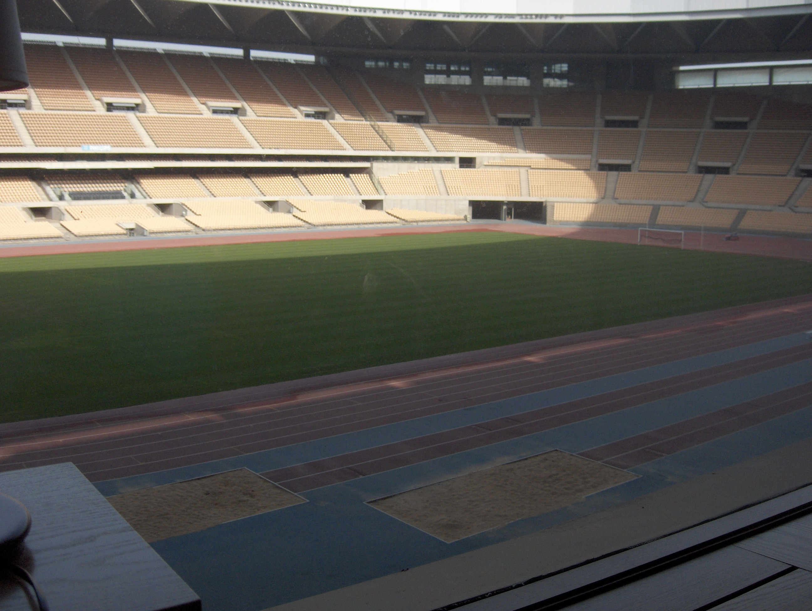 Estadio Olímpico de La Cartuja, en Sevilla (España)